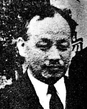 ホーリネス教会の殉教者、小出朋治牧師